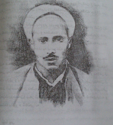 کوردی: taher shushy